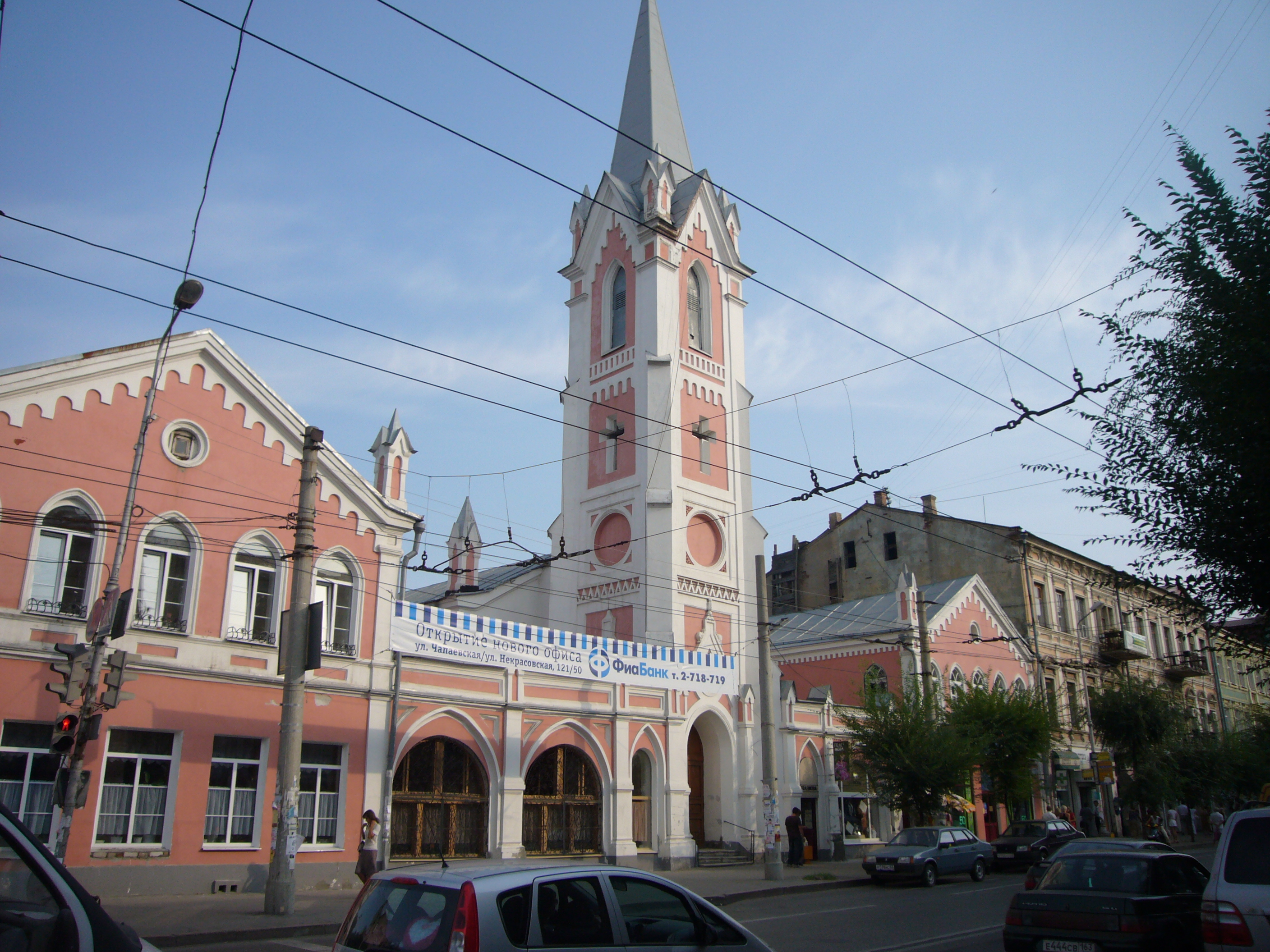 Лютеранская кирха на улице Куйбышева (Самара) (построена в 1865 году)